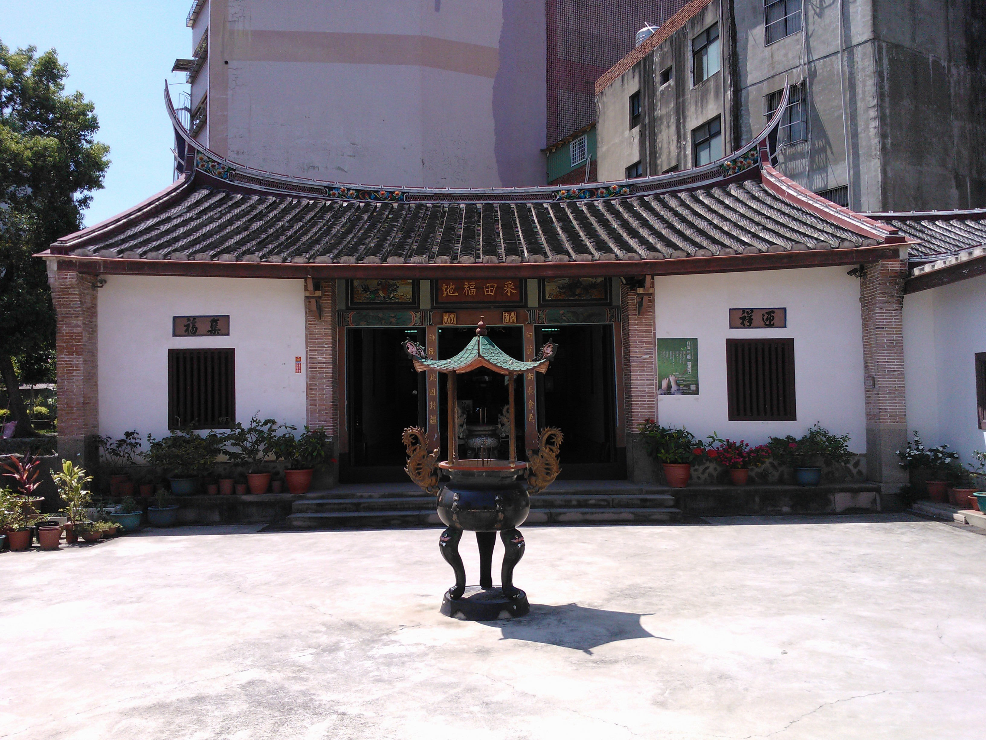 竹北采田福地